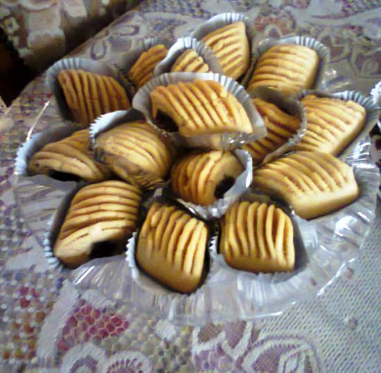 Makroudh originaire de l'est algerien